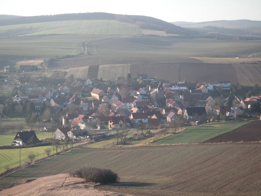 Steinthaleben aus Richtung Osten